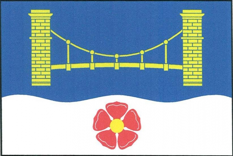 vlajka, Stádlec, okres Tábor